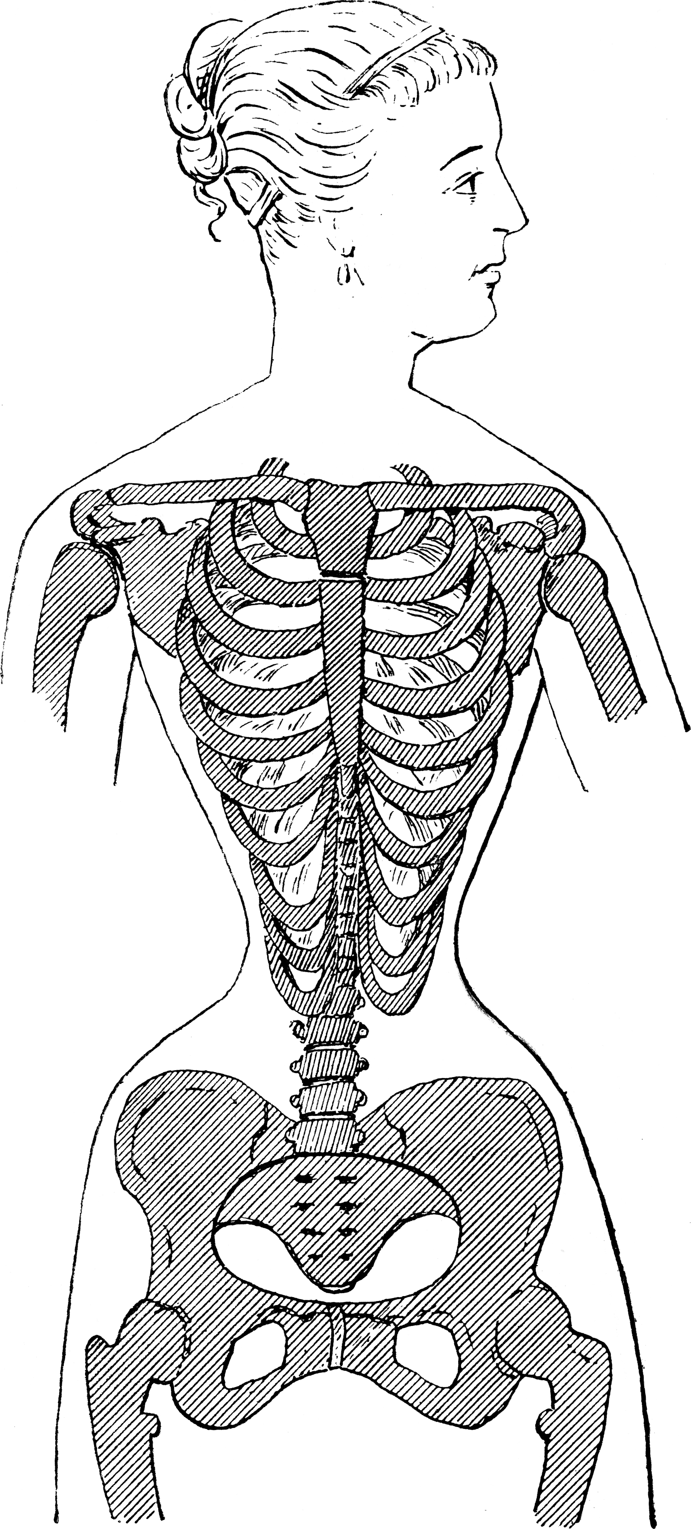 SPECIMEN OF LACING